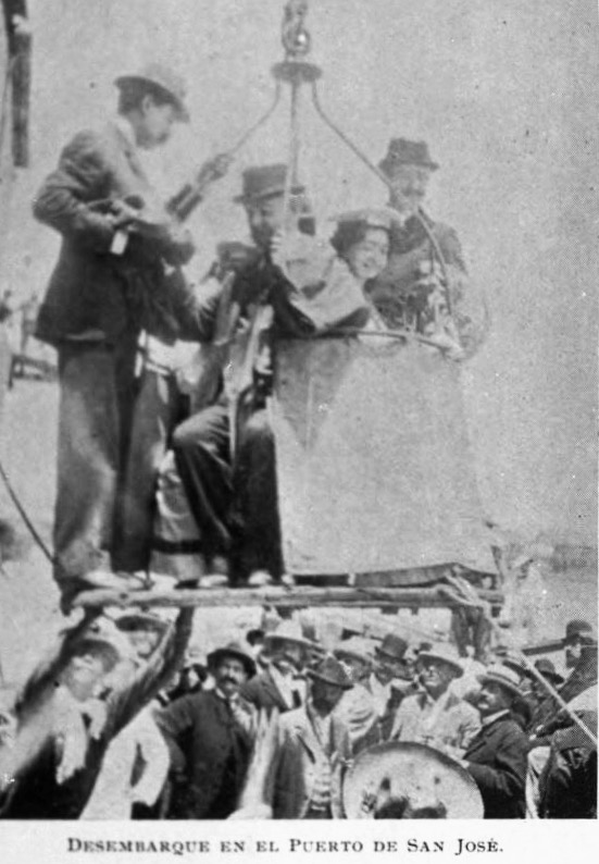 Desembarco de pasajeros en Puerto de San José, Guatemala. 1897.